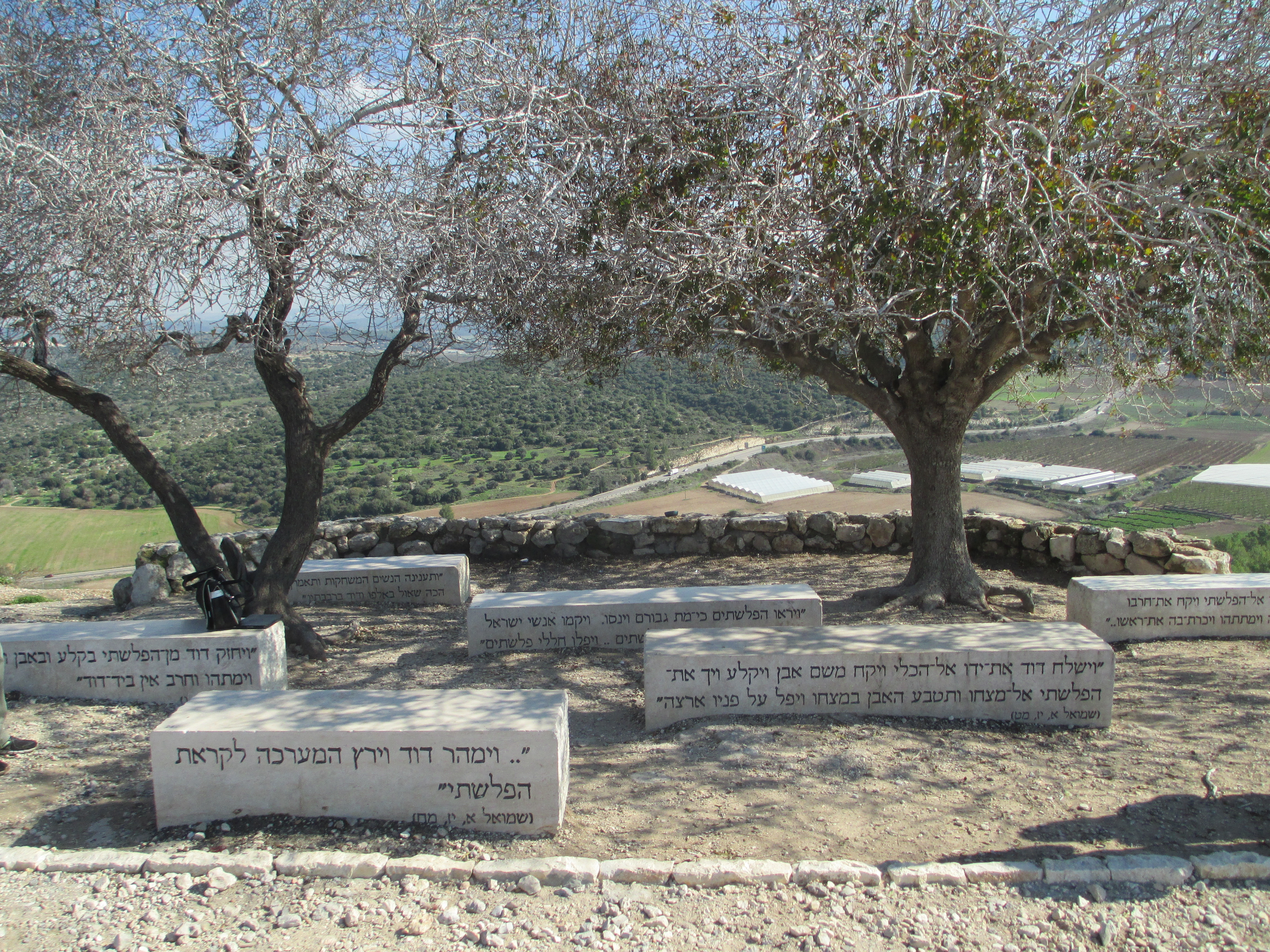 תל עזקה